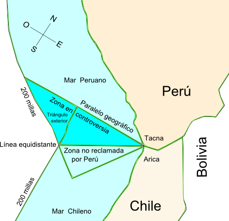 Mapa presentado por Alain Pellet en la fase oral del Caso Peru Chile en el Tribunal de La Haya en diciembre de 2012. El mapa muestra la línea de equidistancia y el paralelo geografico